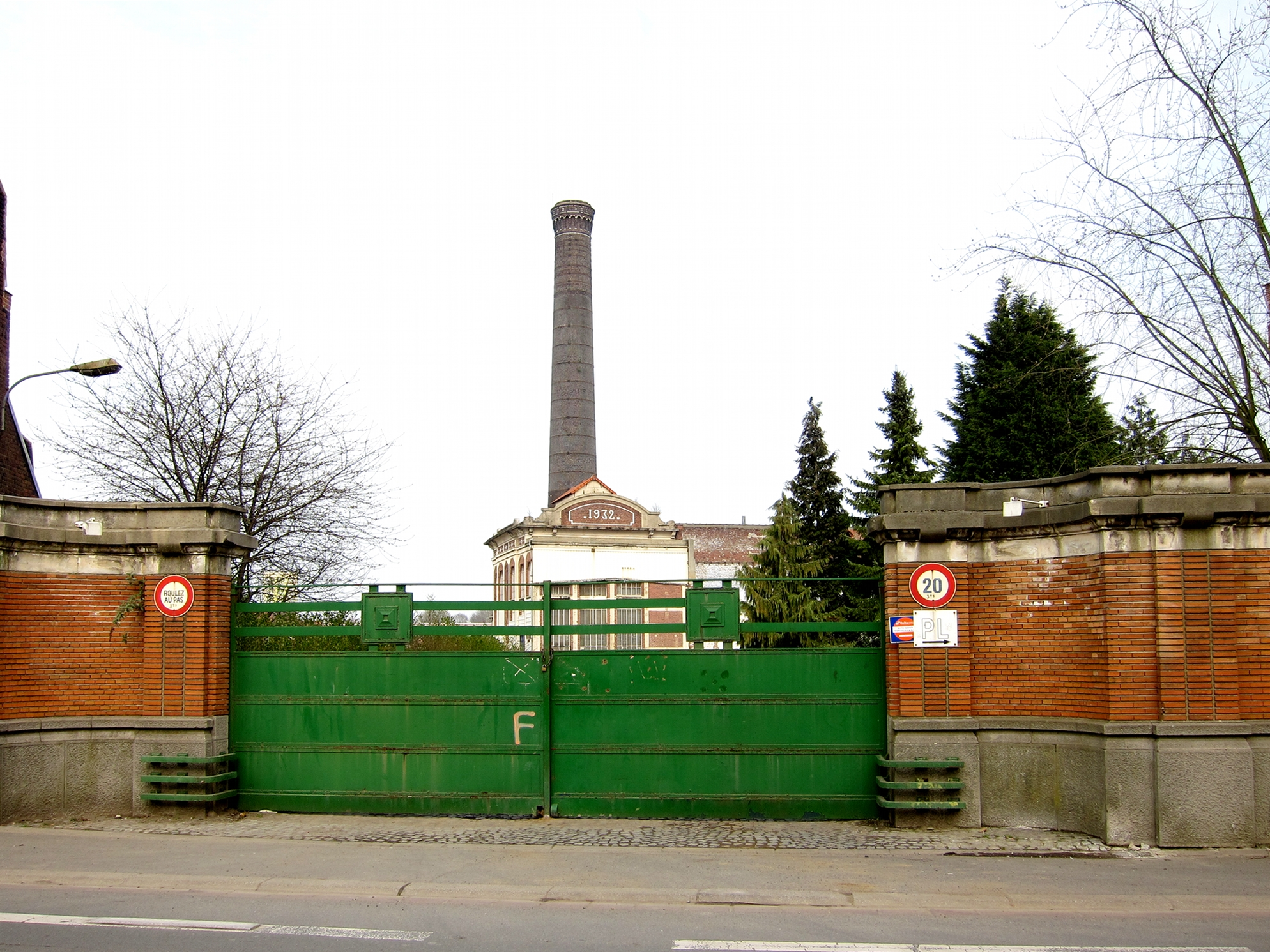 L'entrée de l'ancien peignage de la Tossée à Tourcoing (France - dép. du Nord).